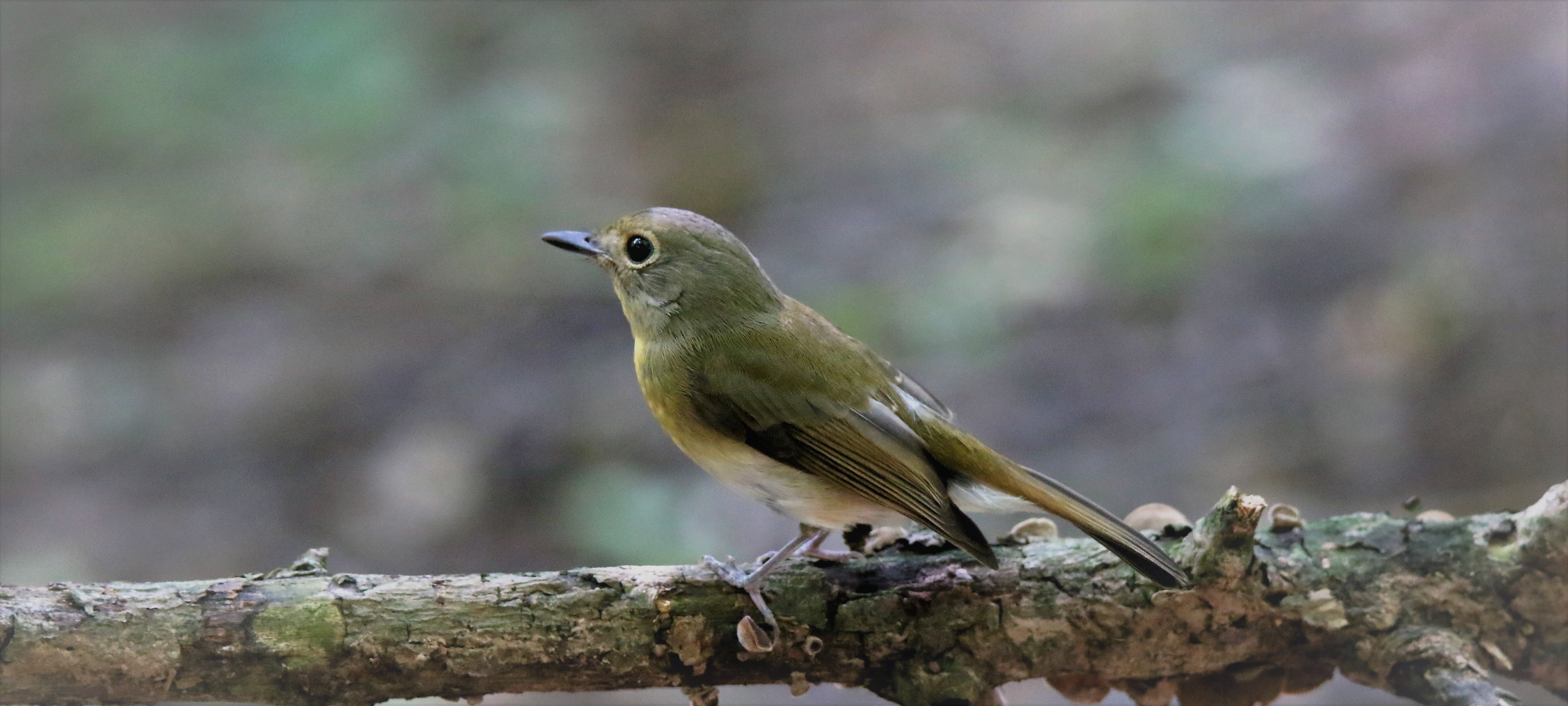 Hainan Blue-flycatcher (femal)